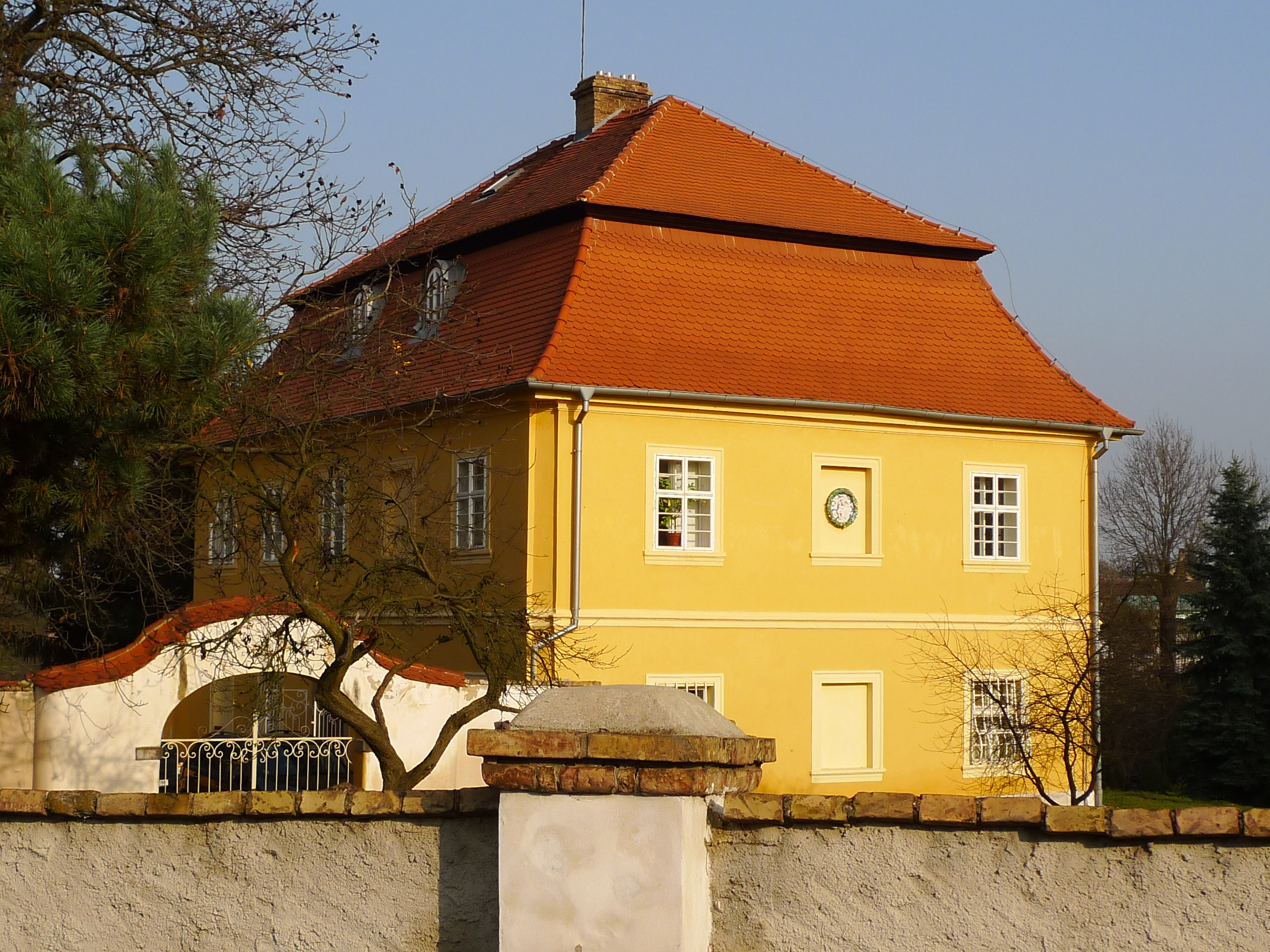 Fara, Dolánky nad Ohří 52, Dolánky nad Ohří.